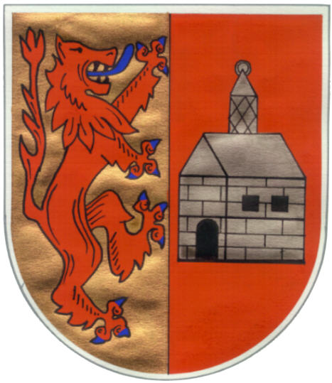 Wappen von Hausen (Hunsrück)